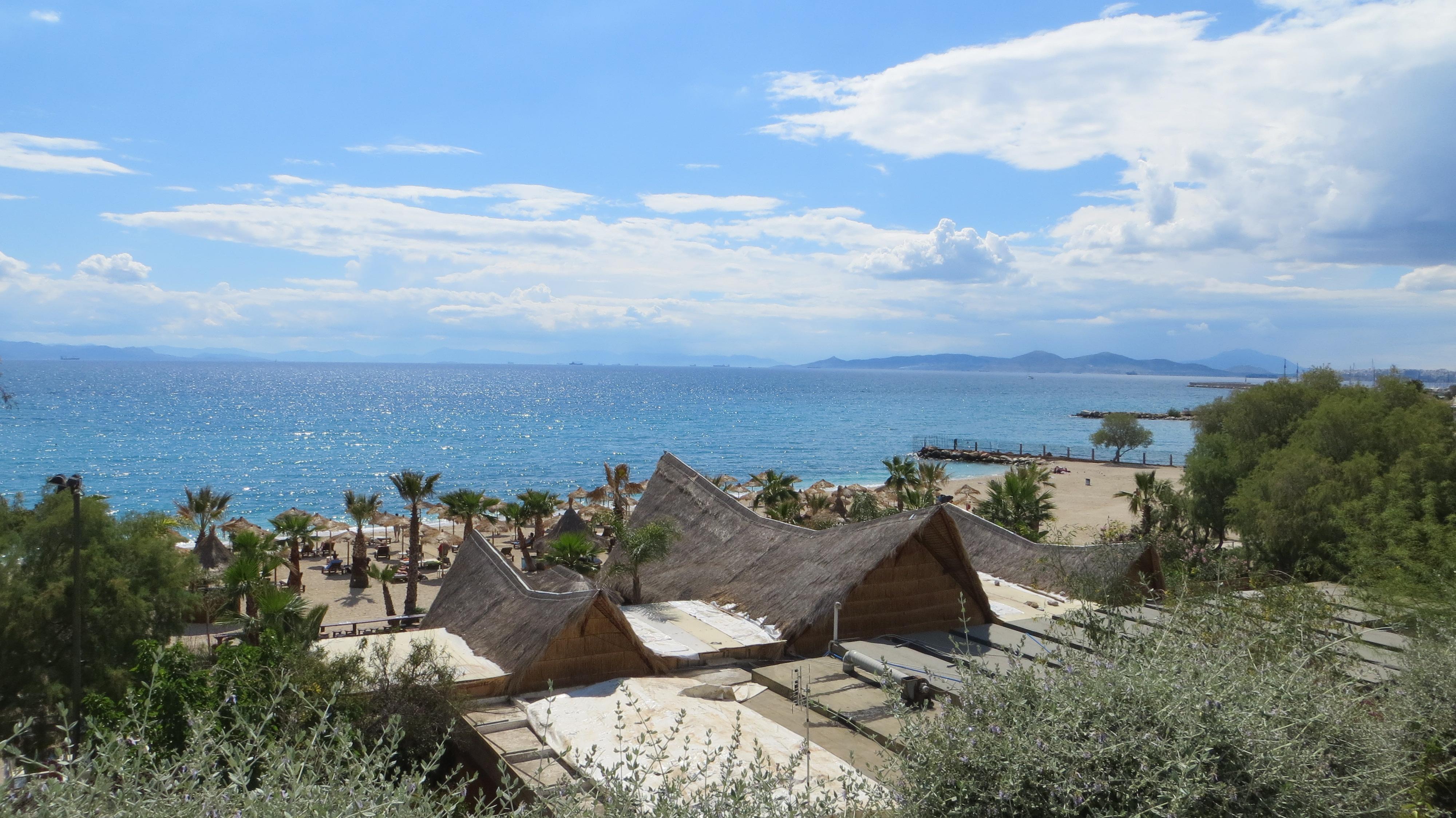 Alimos